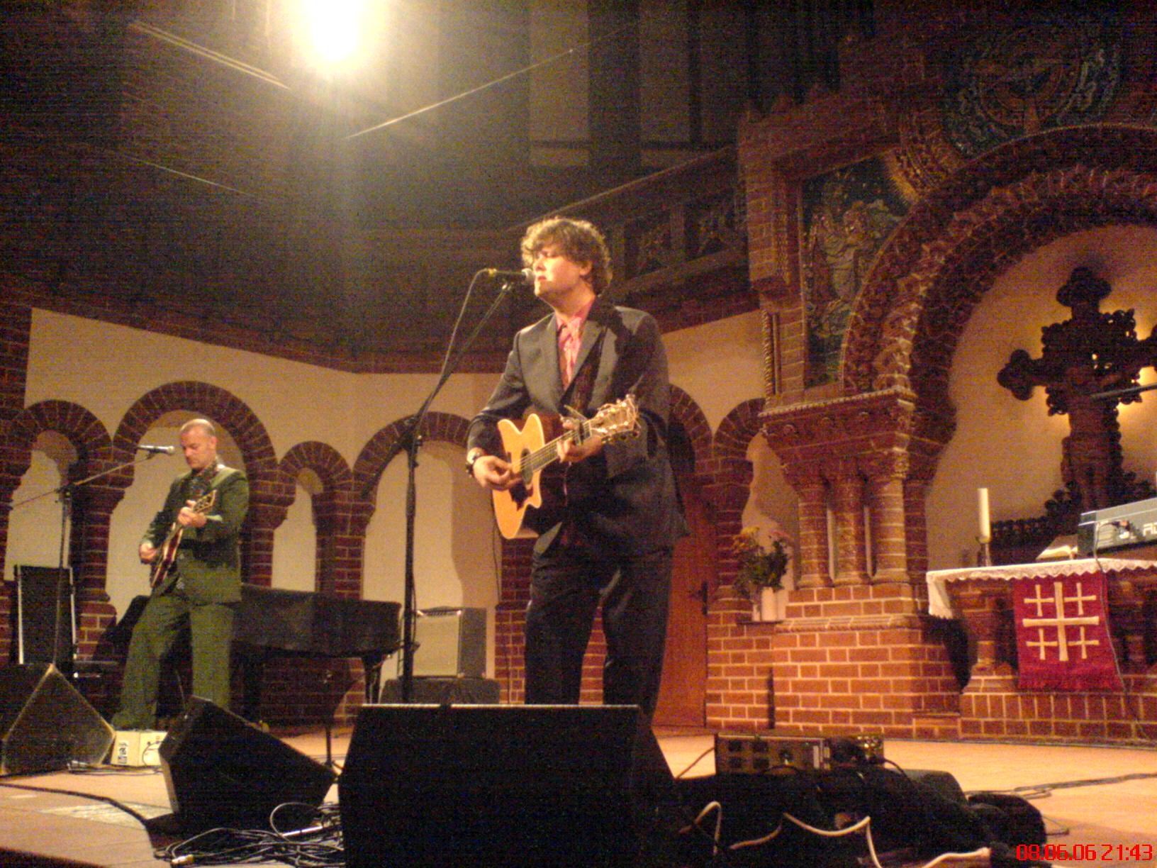 Donnerstag Berlin Kreuzberg Marheinekeplatz Passionskirche Konzert Ron Sexsmith